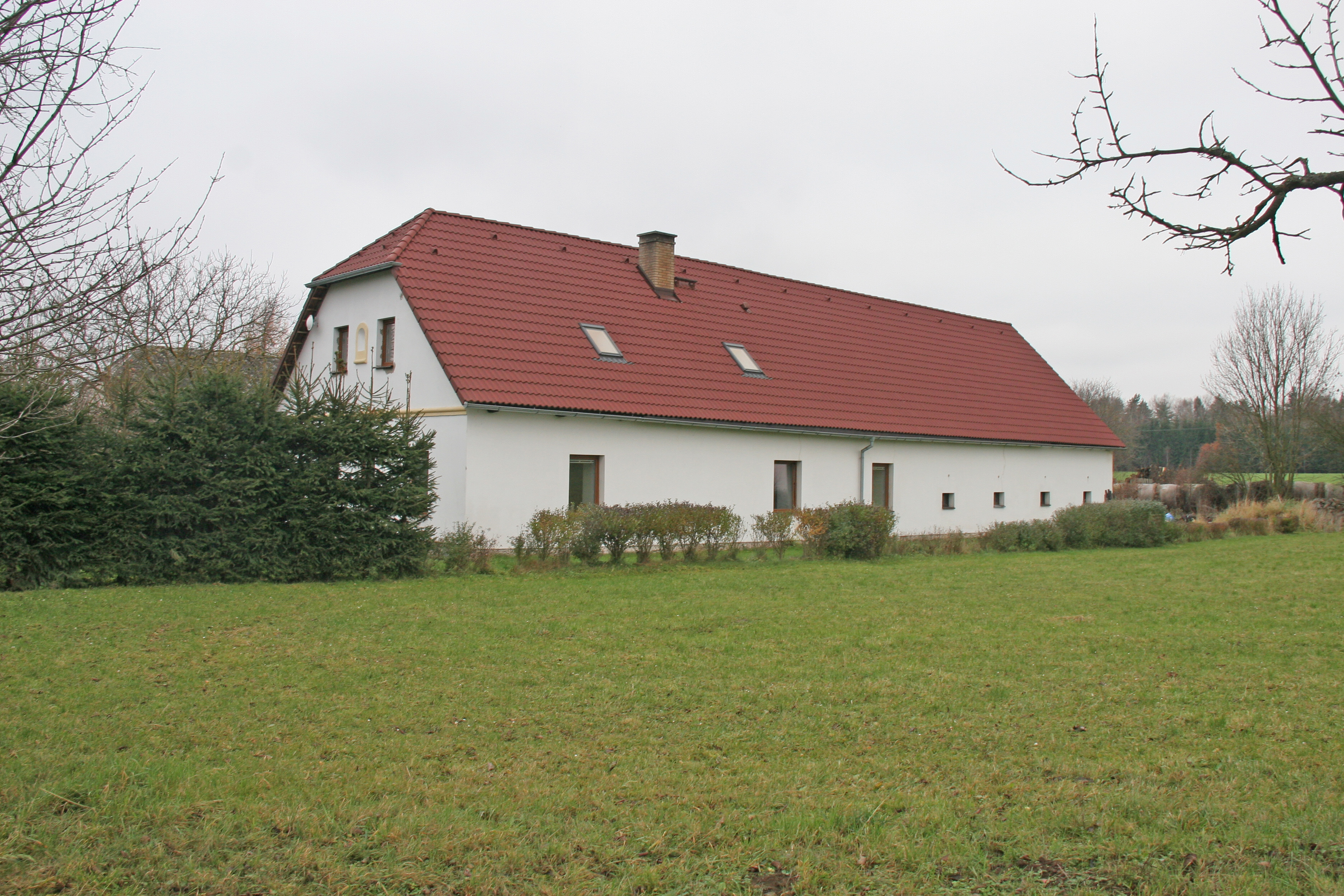 Samařov čp. 1